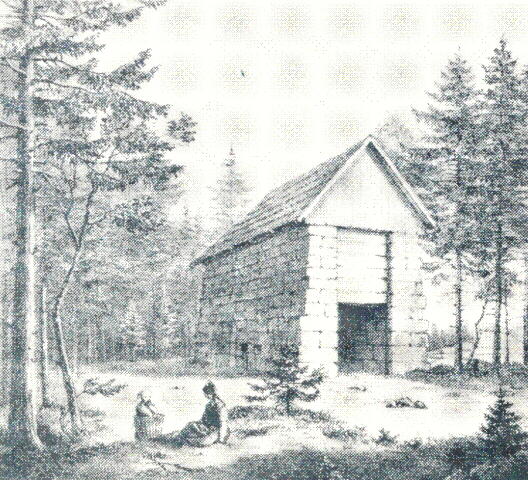 Bärenfang am Großen Waldstein, Zeichnung von Georg Könitzer